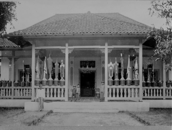 Foto. Voorkant van een Chinese tempel in Ambon, Molukken.